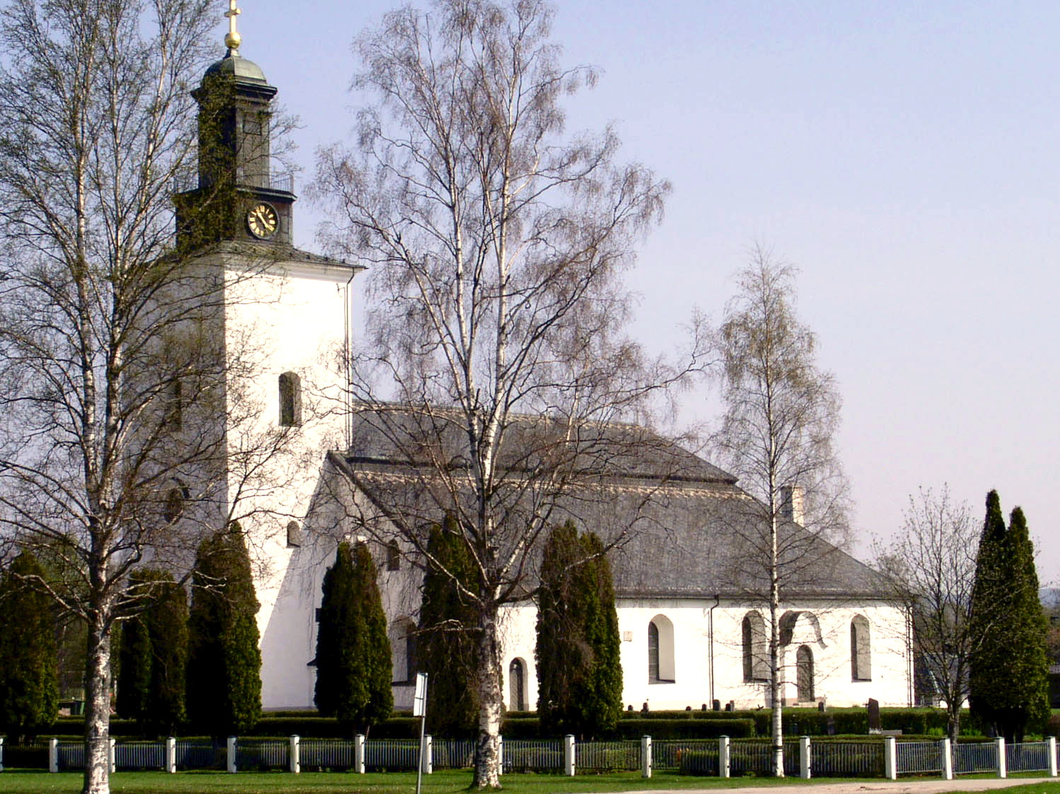 Grangärde kyrka, Dalarna